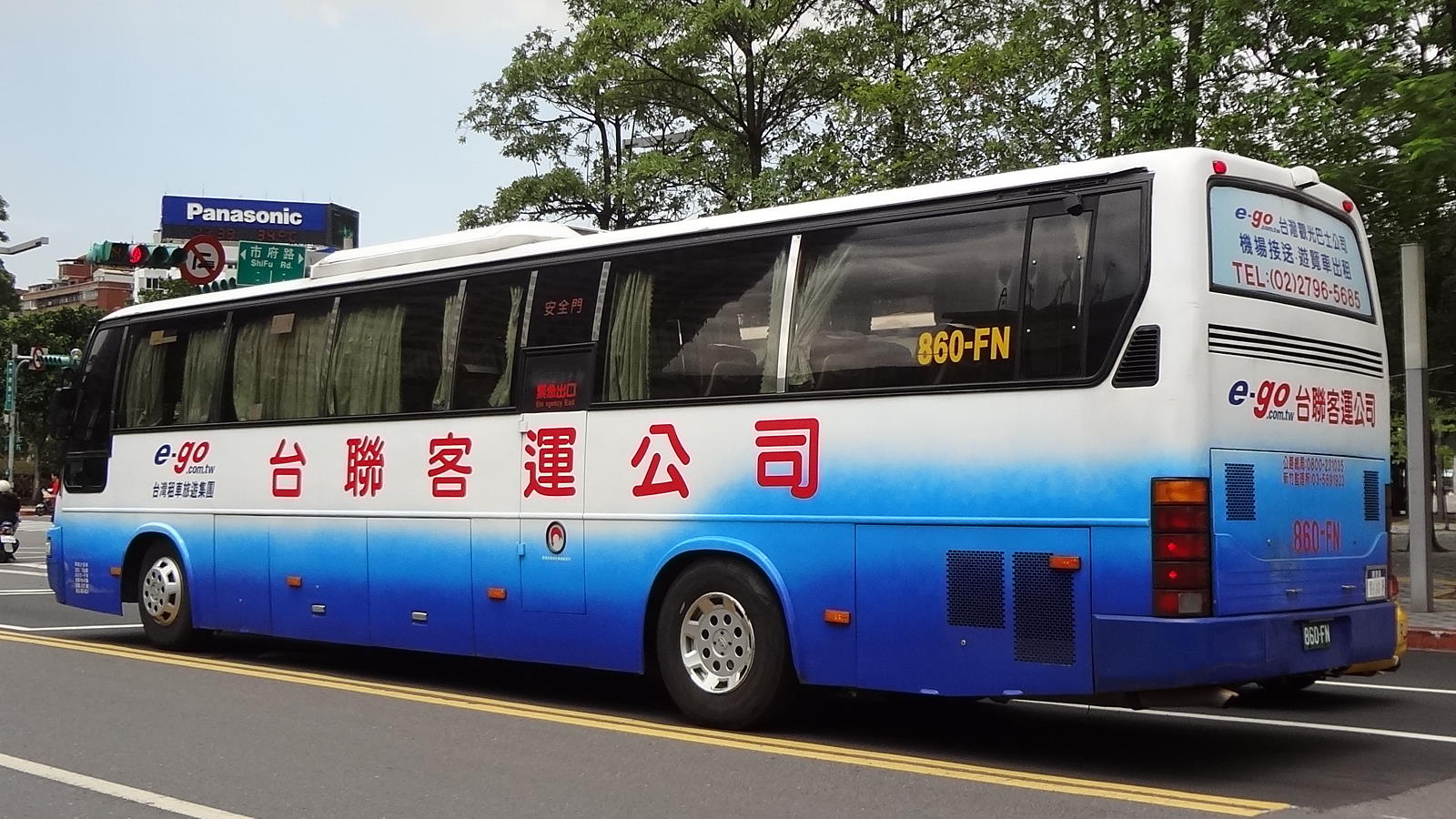 台聯客運大宇BH120大客車860-FN。